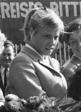 Barbara Göbel